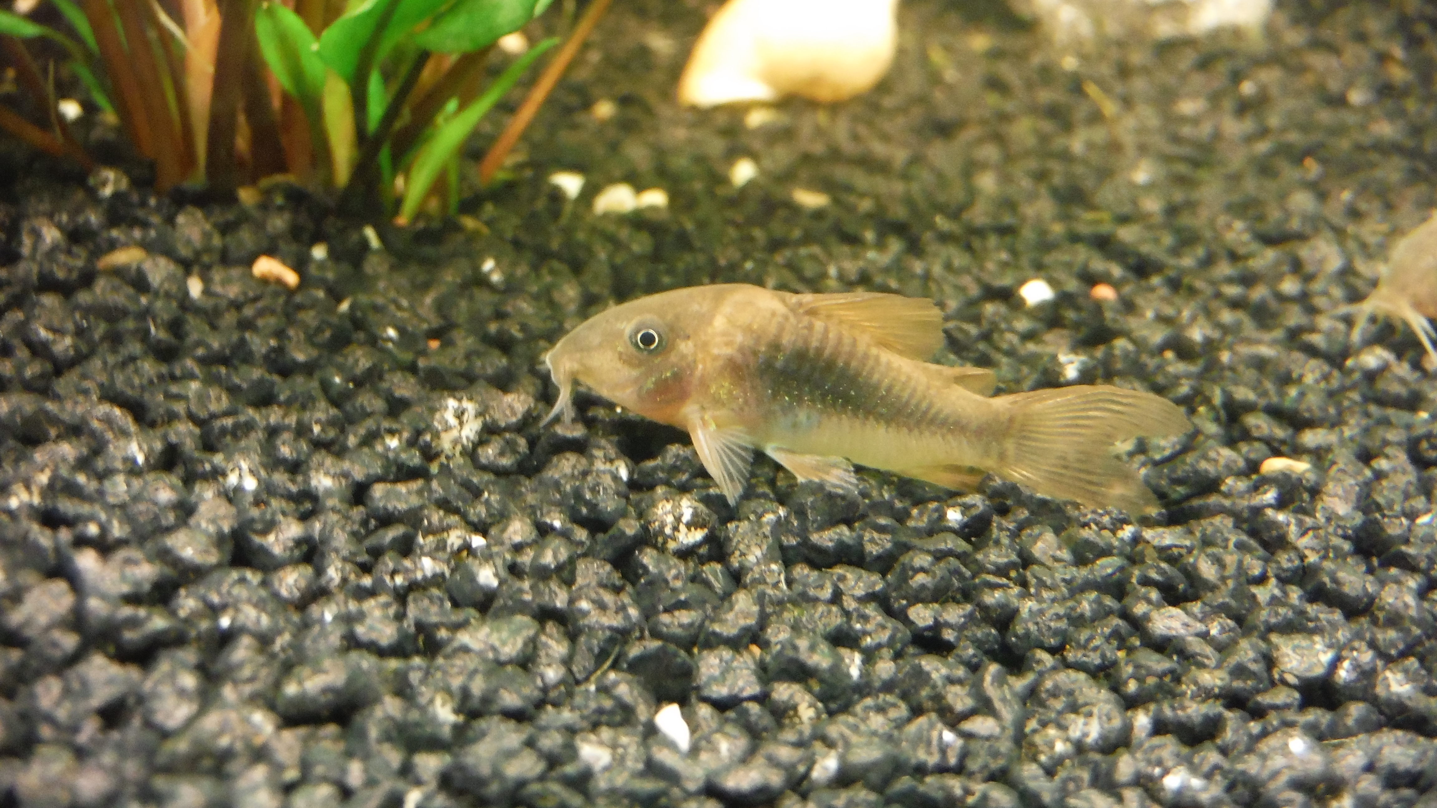 Een corydoras aeneus die aan het rusten is